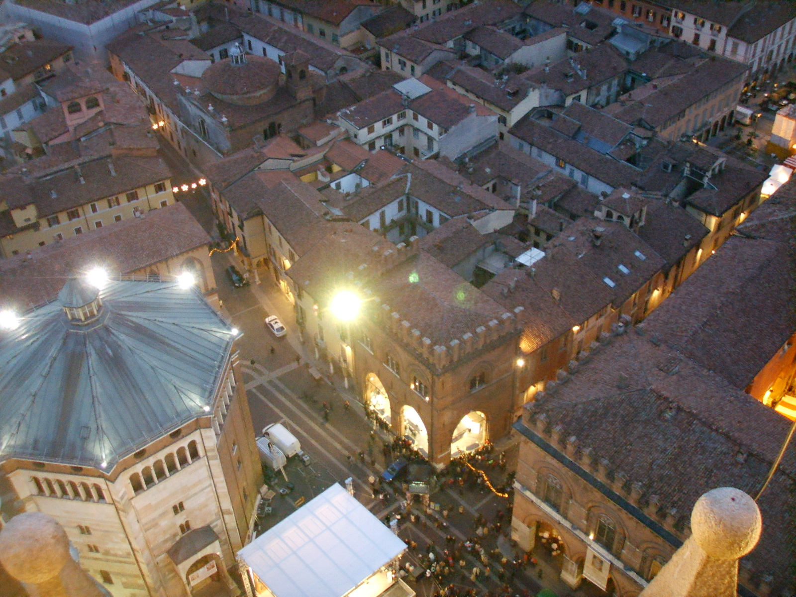 Cremona, vista dal torrazzo 04 piazza del duomo